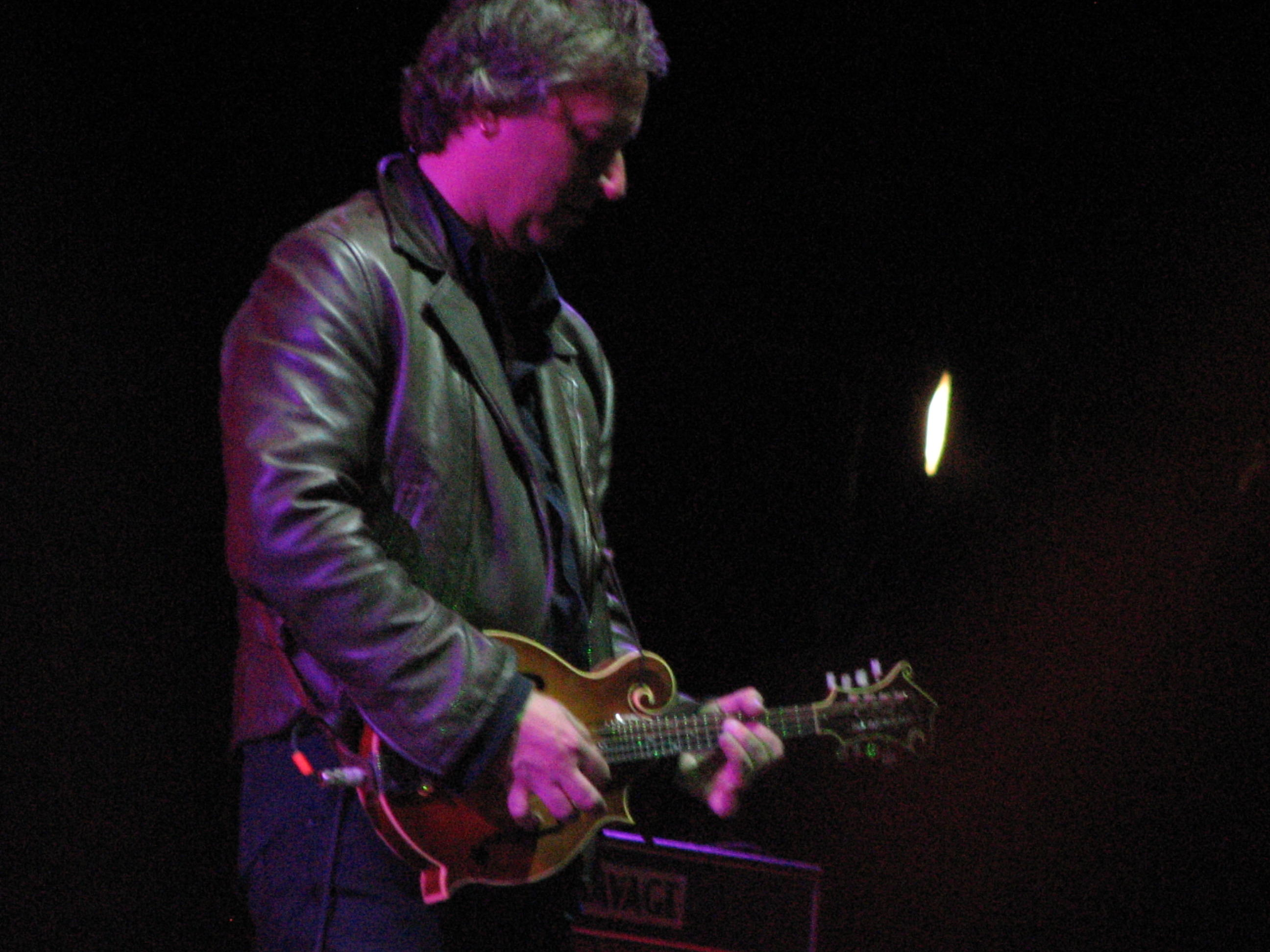 Peter Buck interpretando "Losing My Religion" con una mandolina.